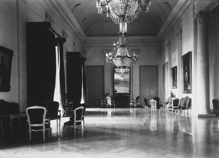 Foto. Zaal in het Paleis van de Gouverneur-Generaal in Buitenzorg